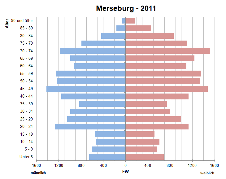 Bevölkerungspyramide der Stadt Merseburg nach Zensus 2011.